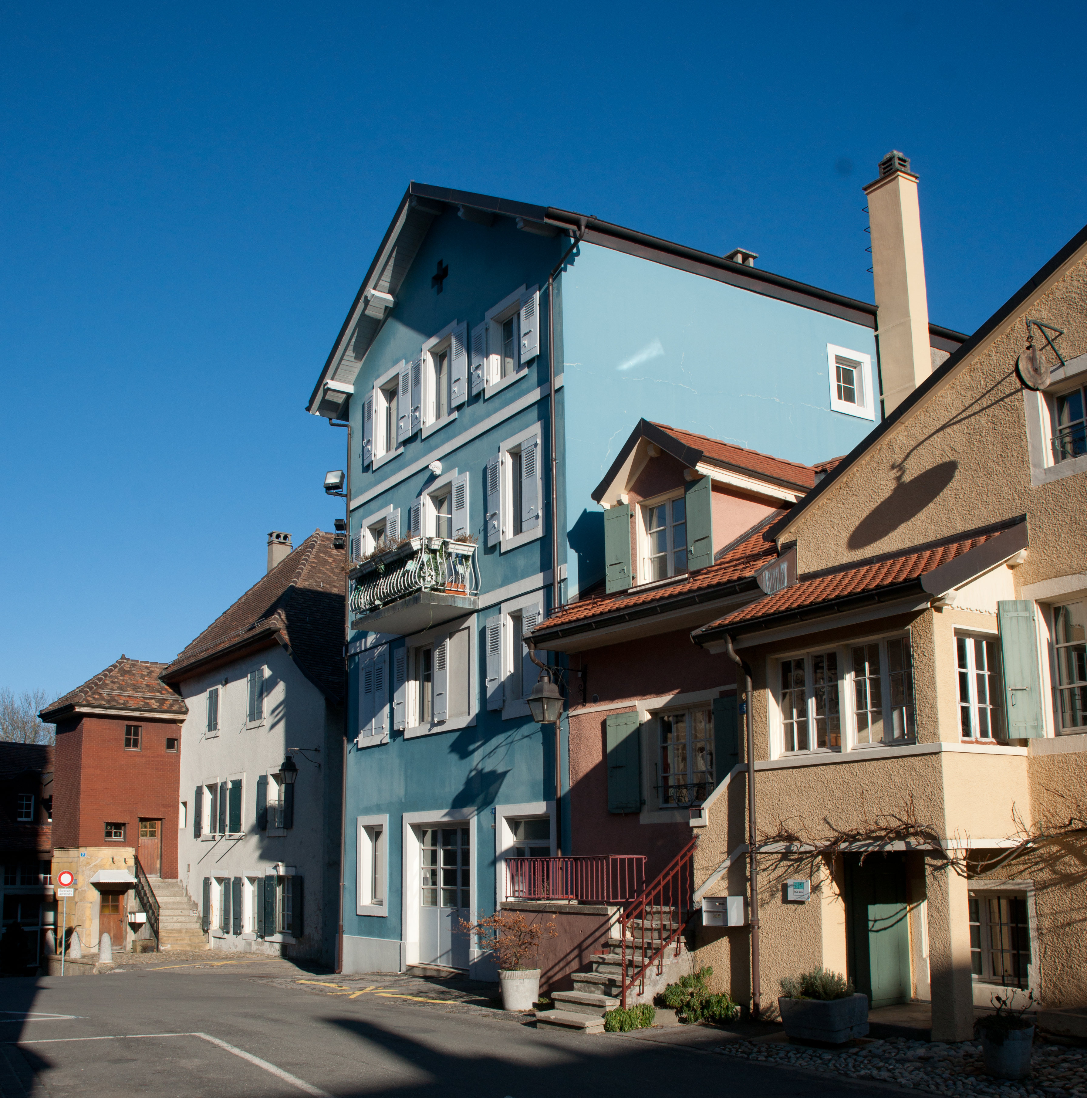 Vielle ville de Cossonay, canton de Vaud, Suisse.